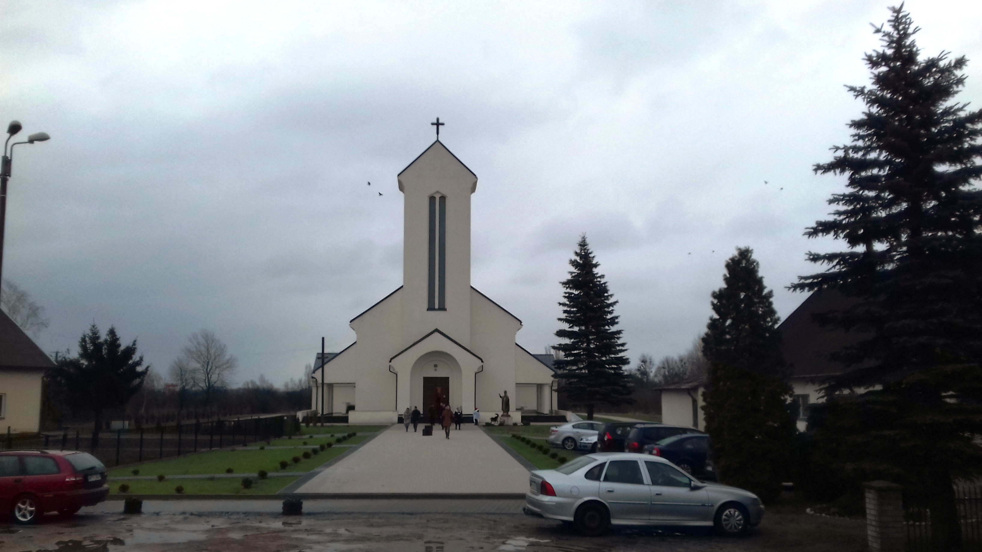 Stare Pieścirogi (gm. Nasielsk, pow. Nowy Dwór Mazowiecki) - kościół Miłosierdzia Bożego